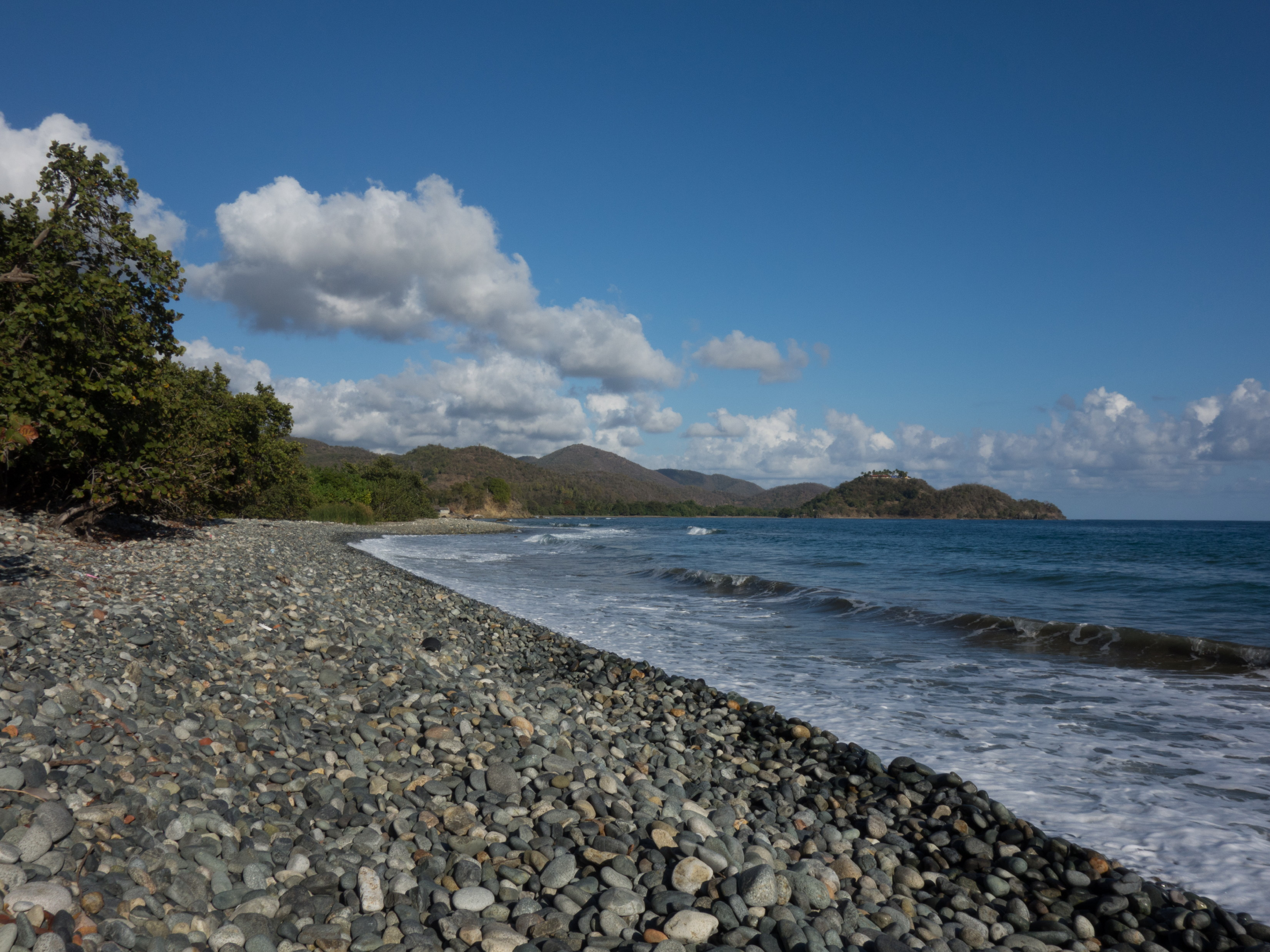 Küste nahe Chivirico in der Gemeinde Guamá, Provinz Santiago de Cuba, Kuba